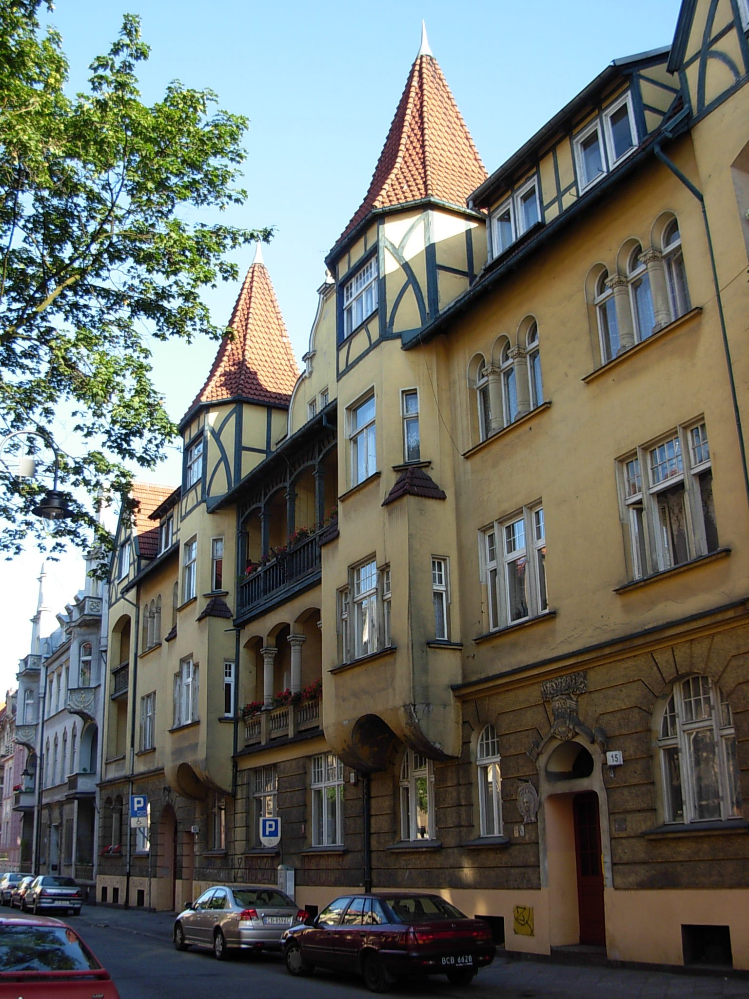 Pierzeja ul Cieszkowskiego (15) w Bydgoszczy